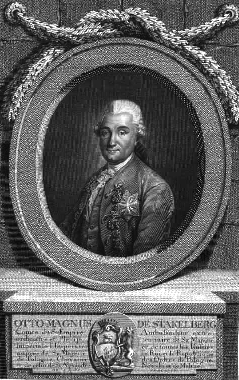 Portrait of Otto Magnus von Stackelberg (1736-1800)